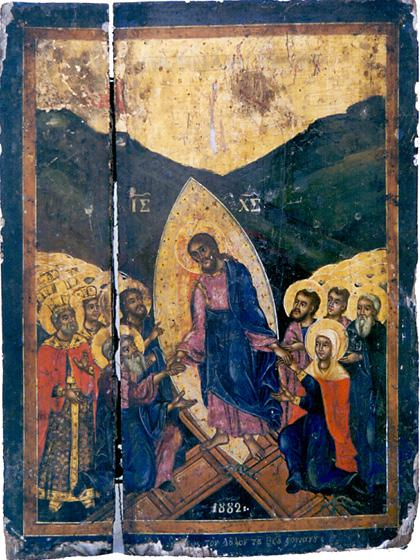 „Възкресение Господне“, 38,5 Χ 50 Χ 2,5. Η ΕΙC ΤΟΝ ΑΔΗΝ ΚΑΘΟΔΟC. ΙΣ ΧΣ 1882:· Δ[ιὰ] δε[ήσ]εως τὸν Δοῡλον τοῡ Θεοῡ στογιάνου :·